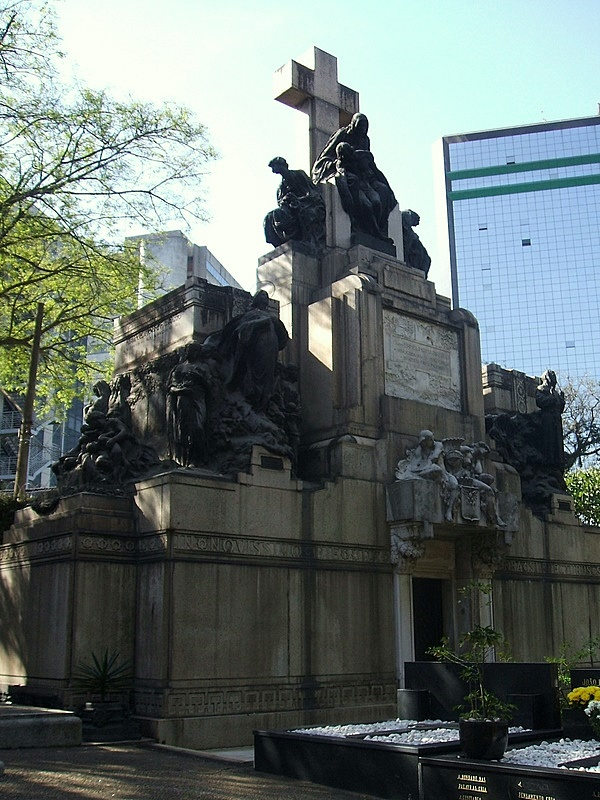 Luigi Brizzolara (1868-1937) - Mausoléu da Família Matarazzo, no Cemitério da Consolação, São Paulo, Brasil